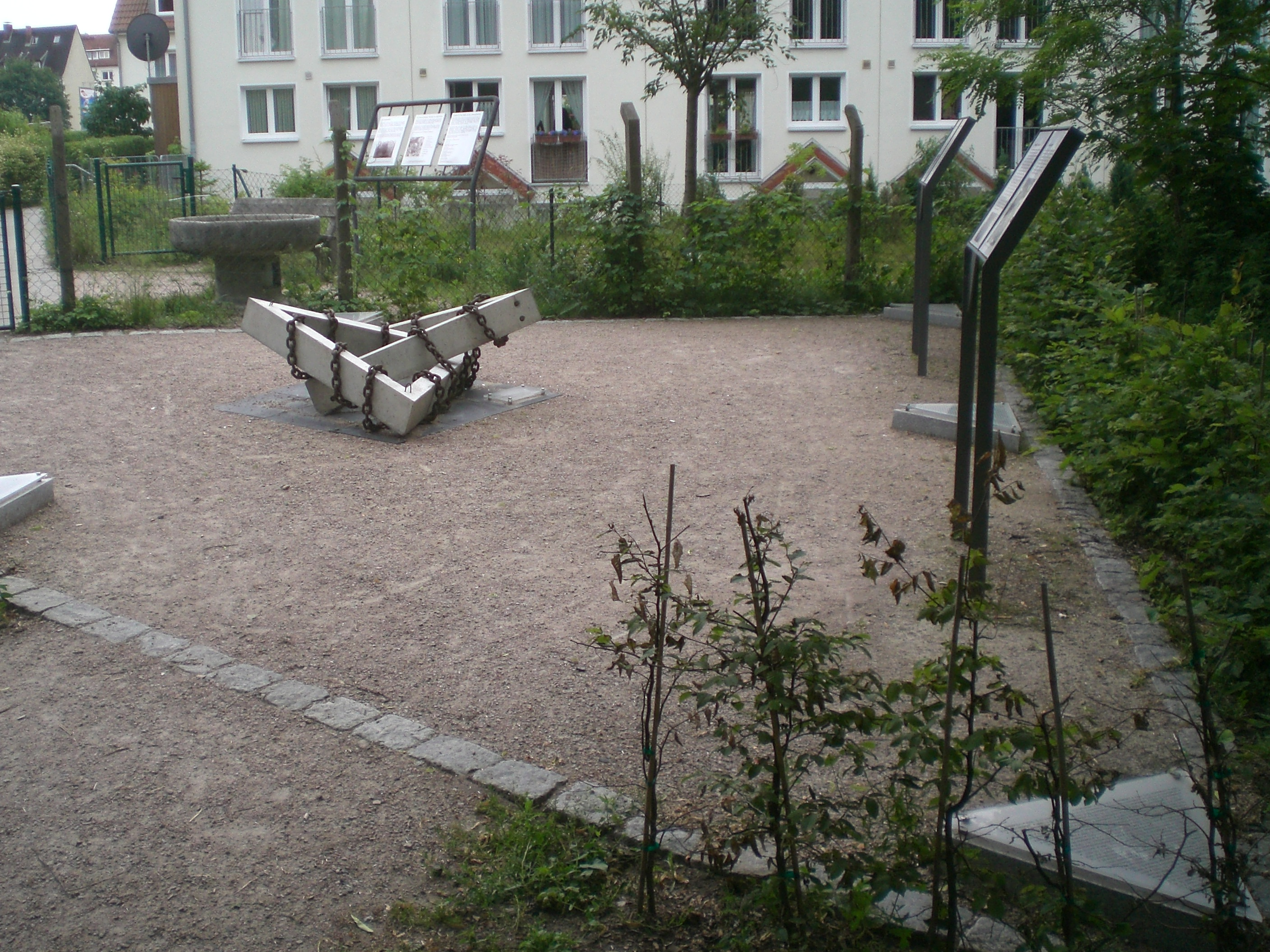 Gedenkstätte am Ort des ehemaligen KZ-Außenlagers Drägerwerk in Hamburg-Tonndorf. Im Hintergrund die 2004/05 erbaute Wohnsiedlung "An der Rahlau". Davor ein erhaltener Waschtrog und erhaltene Zaunpfähle.[1] ↑ Wegweiser zu Gedenkstätten in Hamburg, Hamburg 2008, S. 73, abgerufen am 18. Juni 2011